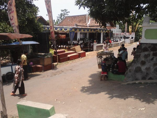 Karanggeneng